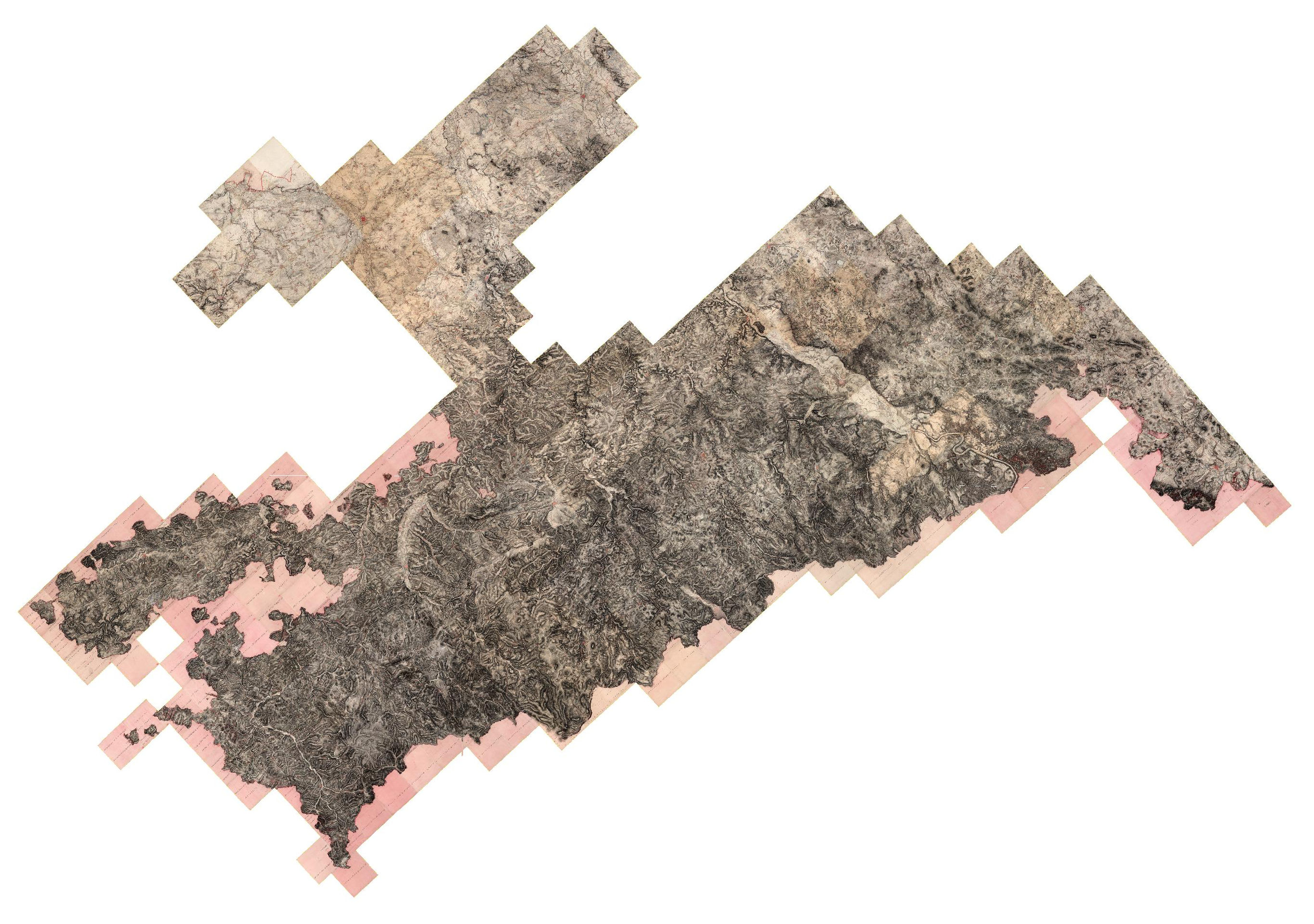 Übersicht des georeferenzierten Berliner Exemplars